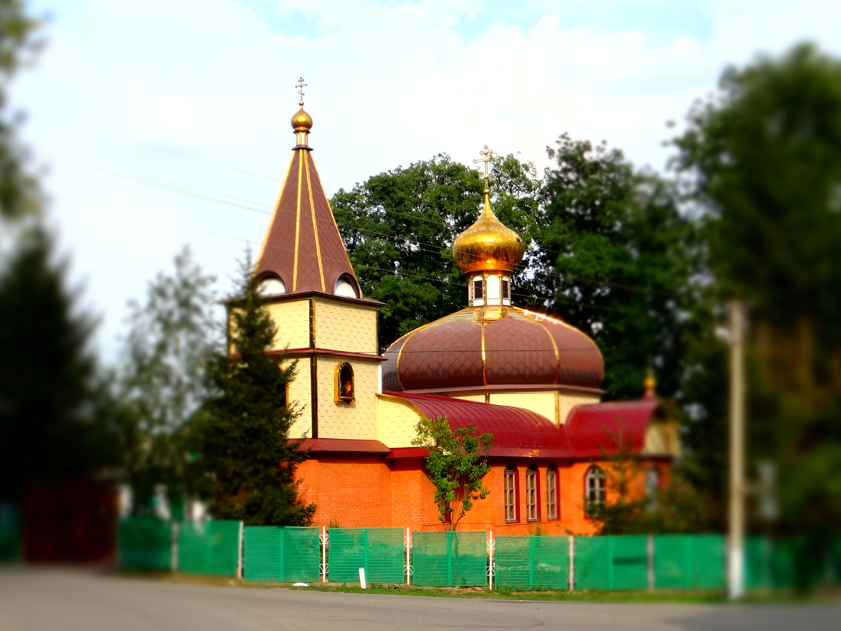 Святопреображенская церковь с интерьером (Краснодарский край, Лабинск, посёлок псебай, центр)